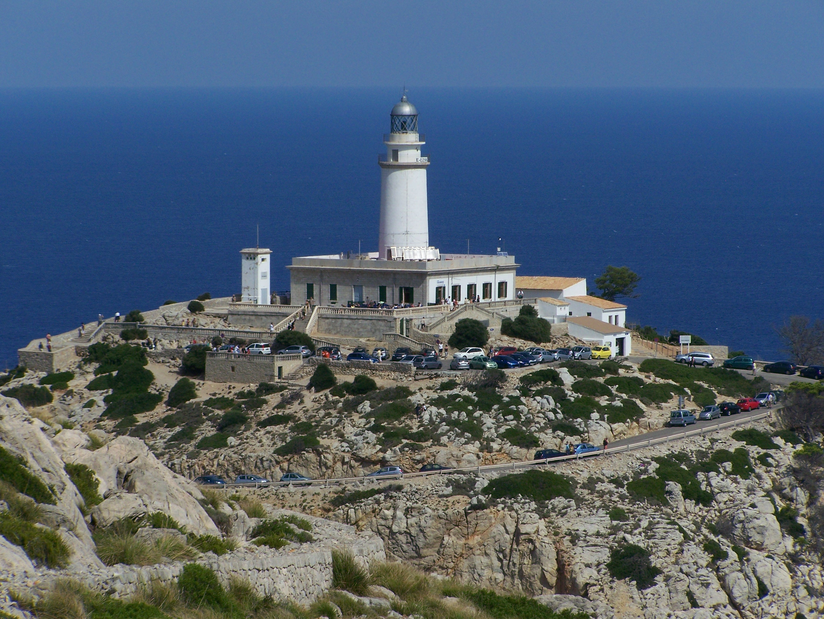 Leuchtturm am Cap Formentor